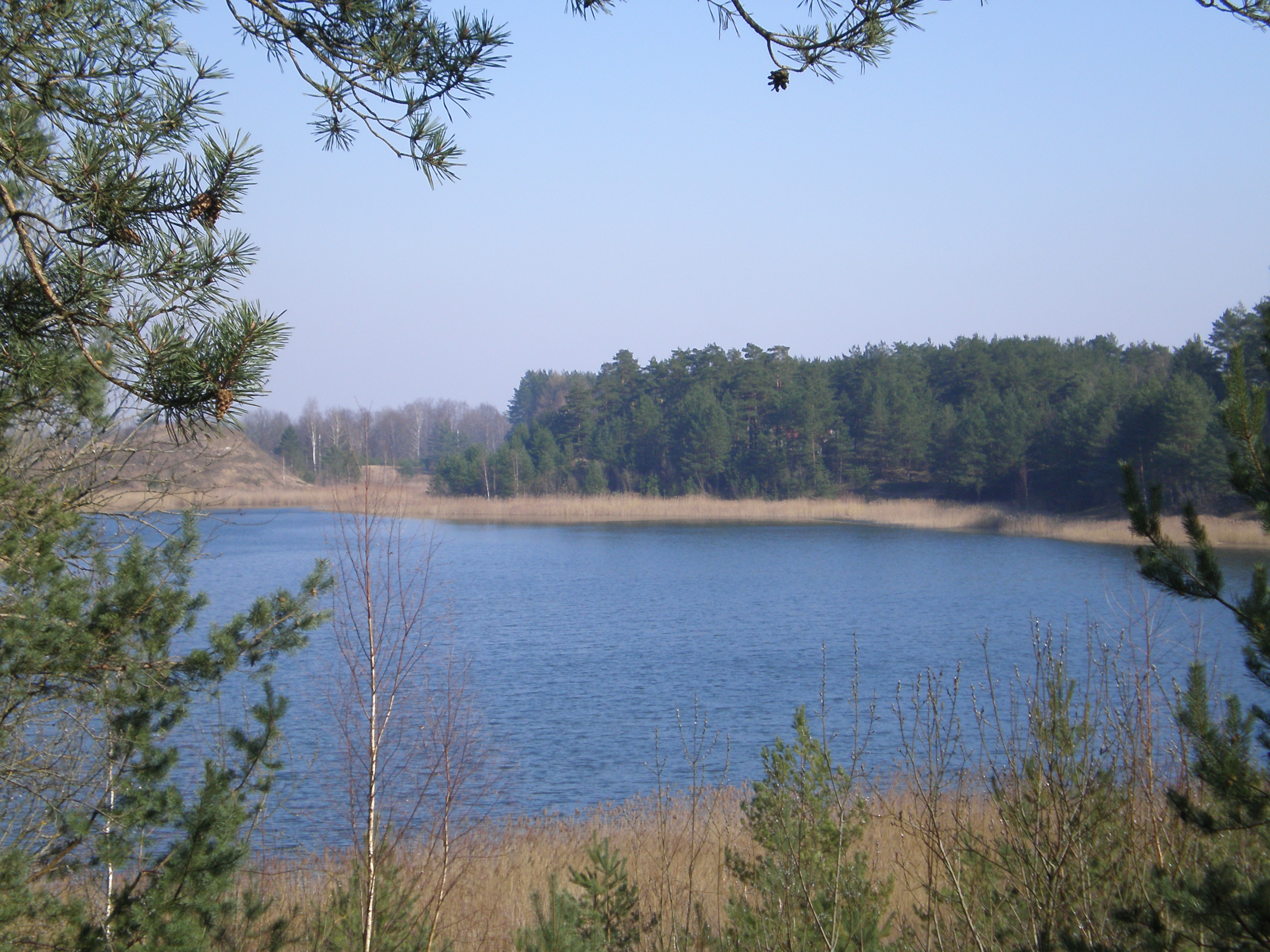 Babėnų karjeras, Kėdainiai